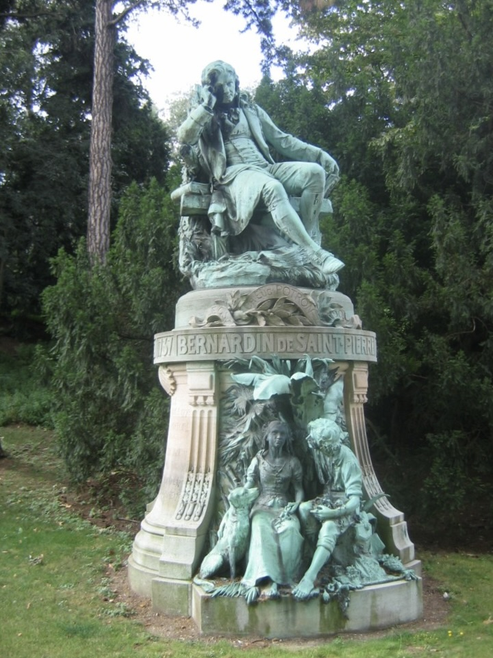 Statue de Bernardin de Saint-Pierre, jardin des plantes de Paris. Auteur: Louis Holweck (1861-1935)